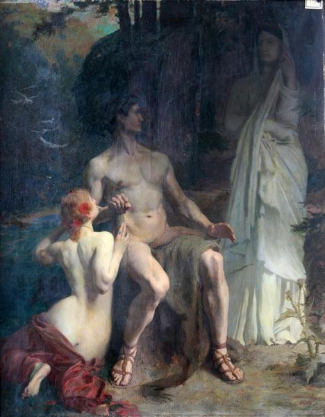 Laurent Jacquot-Defrance, Hercule entre le Vice et la Vertu, 1899, Perpignan, musée Hyacinthe Rigaud